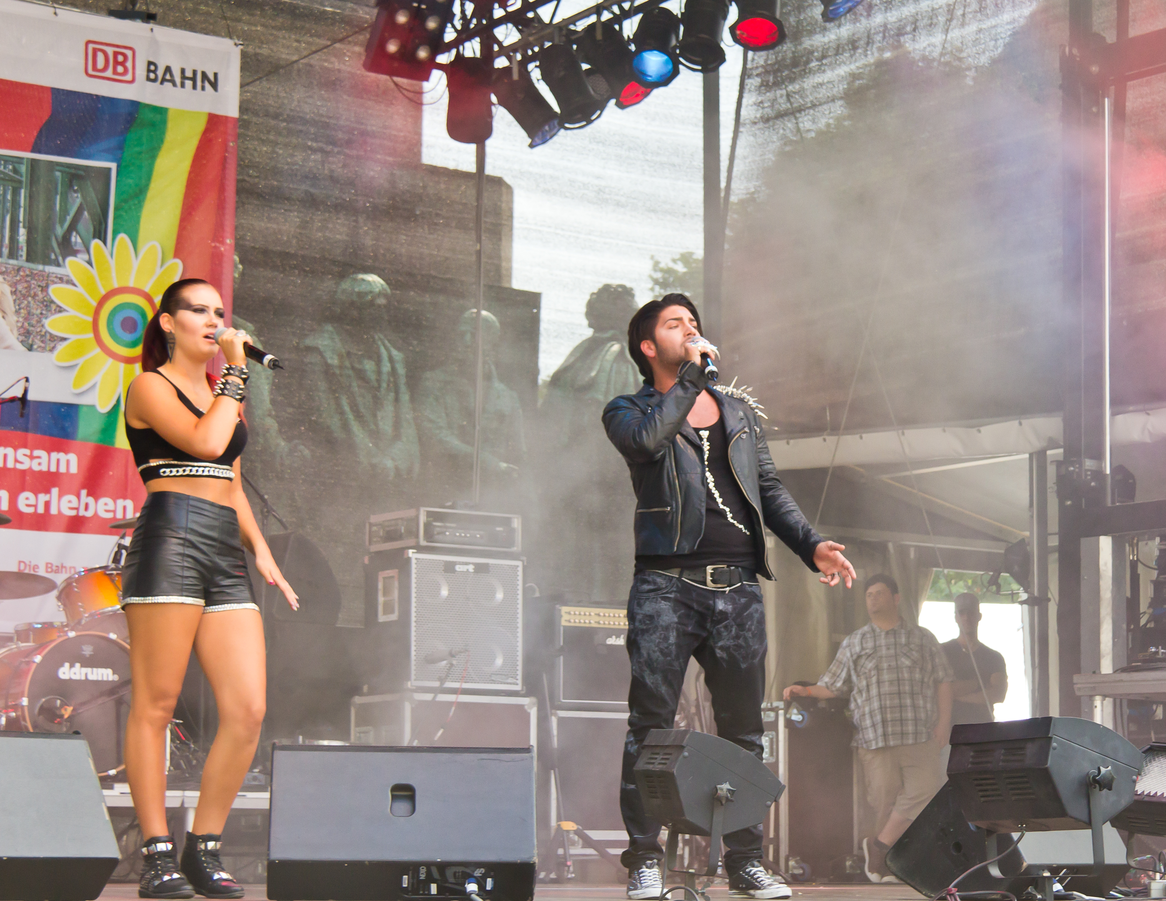 Auftritt von Pro2Type auf der Hauptbühne (Heumarkt) während des Straßenfestes zum CSD/ColognePride 2013